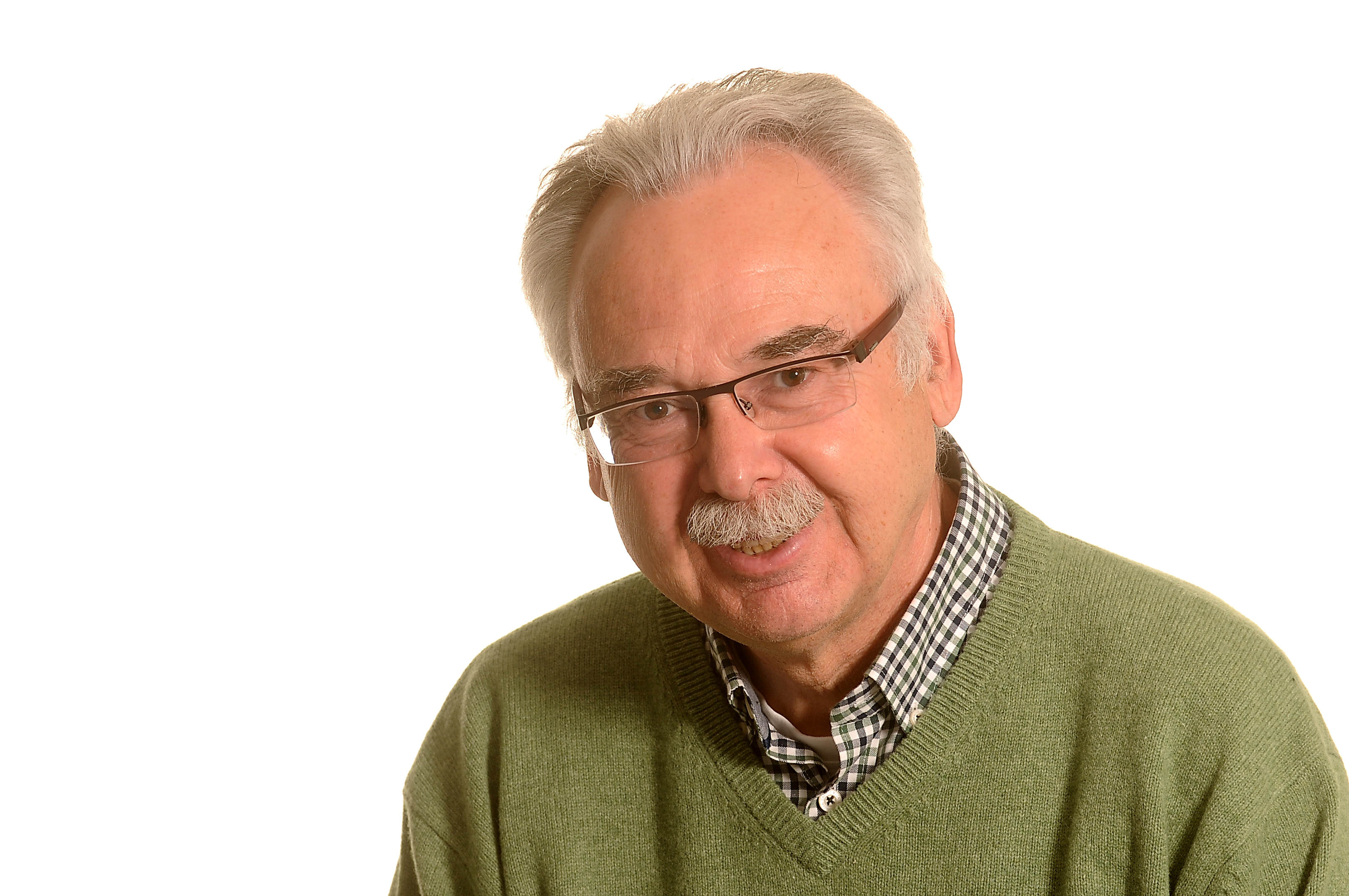 Thomas Feltes